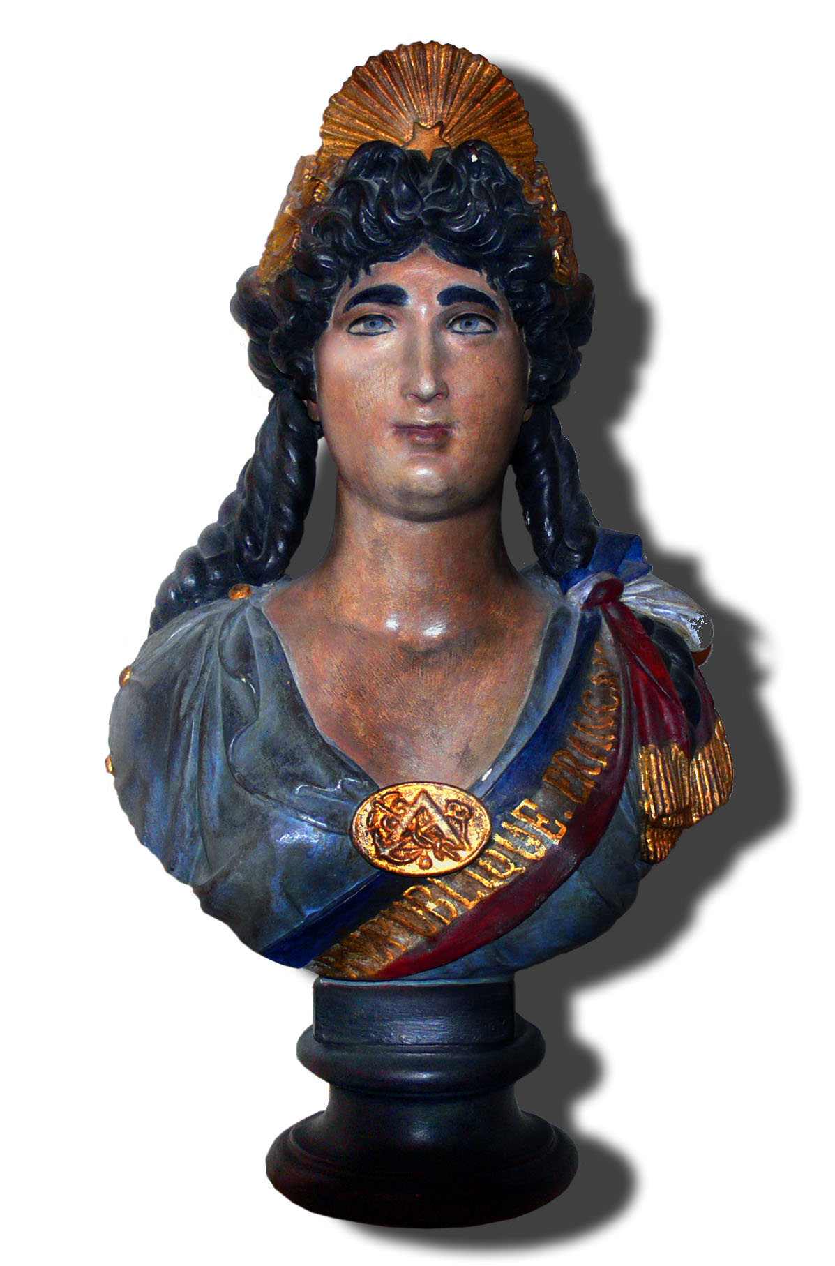 Buste ancien de Marianne (anonyme), un des symbole de la république française exposé au Sénat Photo de F Lamiot (own Work) faite le 15 novembre 2006